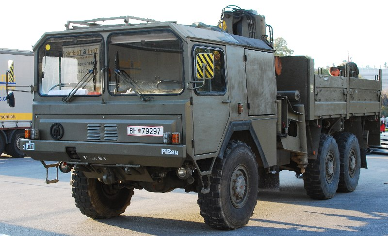 3achsiger ÖAF-sLKW des österreichischen Bundesheeres